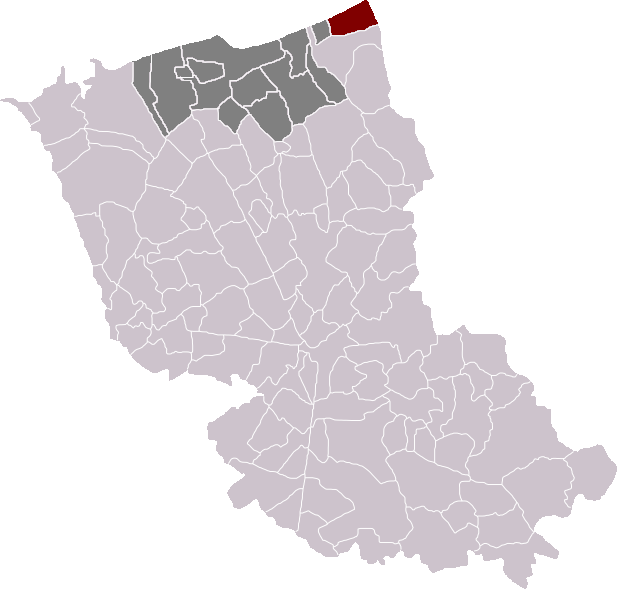 Locatie gemeente Bray-Dunes in arrondissement Duinkerke. Zelfgemaakt. Location of Bray-Dunes municipality in the arrondissement of Dunkirk. Self made. Localisation de la commune de Bray-Dunes dans l'arrondissement de Dunkerque. Fait moi-même.